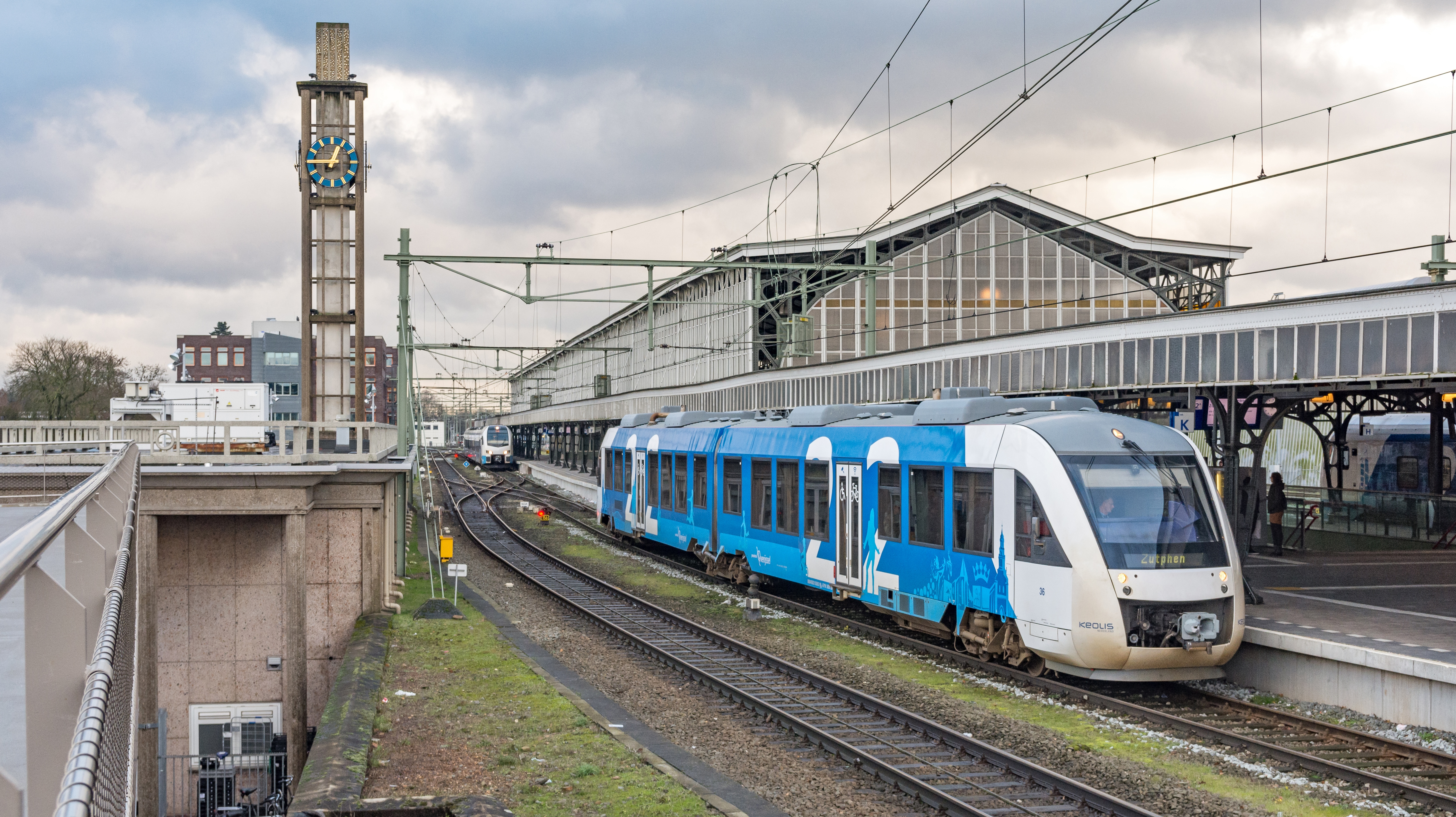 Inmiddels is de volledige Syntus uitstraling naar Keolis (Blauwnet) omgedoopt. Zo zien we in Hengelo Keolis (Blauwnet) Lint 36 als trein 31246 naar Zutphen staan. Het was sowieso een Keolis momentje; achter de Lint staat de Flirt naar Zwolle en rechts, aan de andere zijde de Flirt naar Enschede.